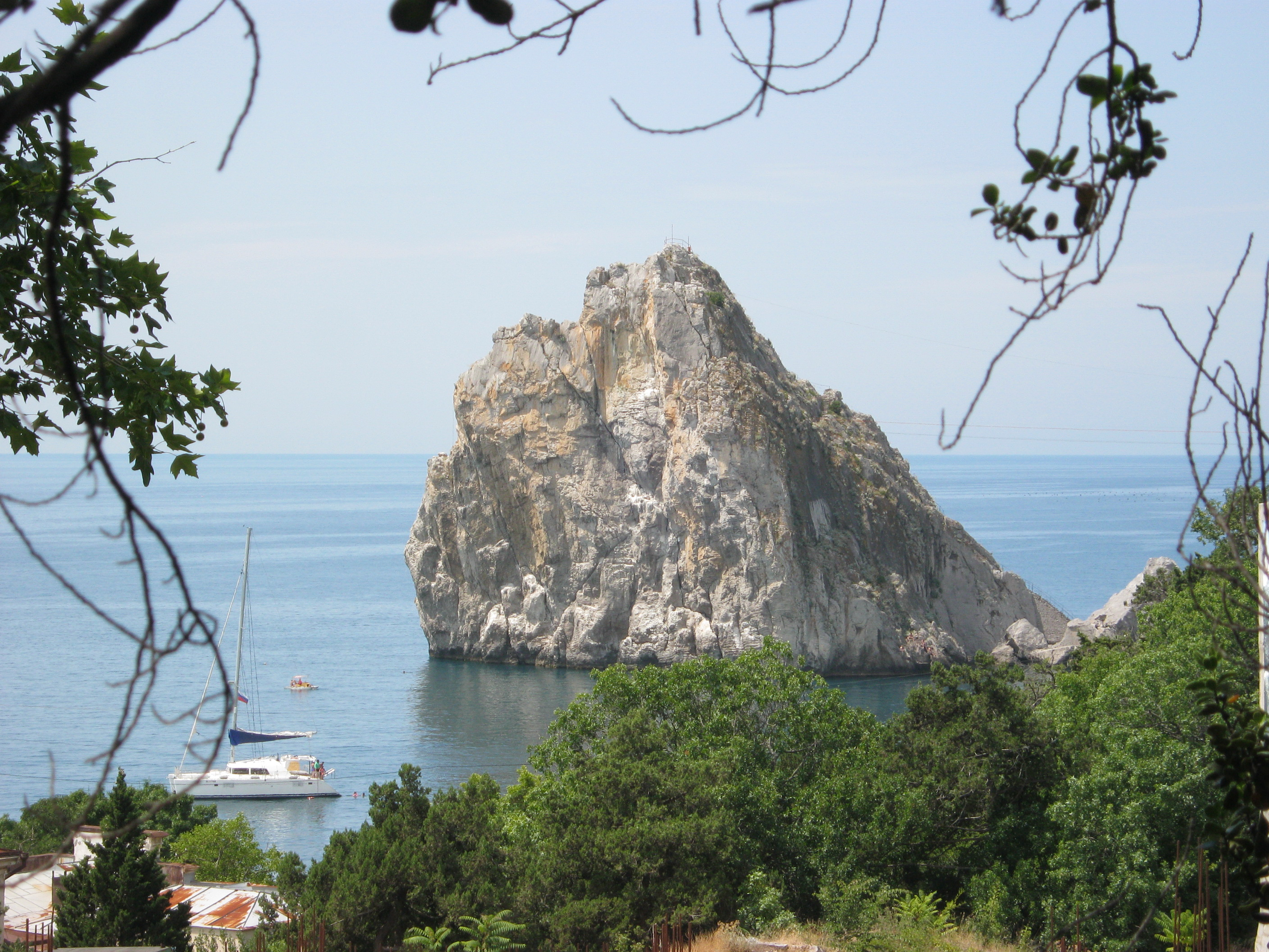 Скала Дива, Симеиз, Крым